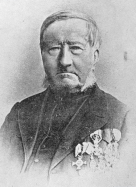 Ksiądz Jan Dzierżoń